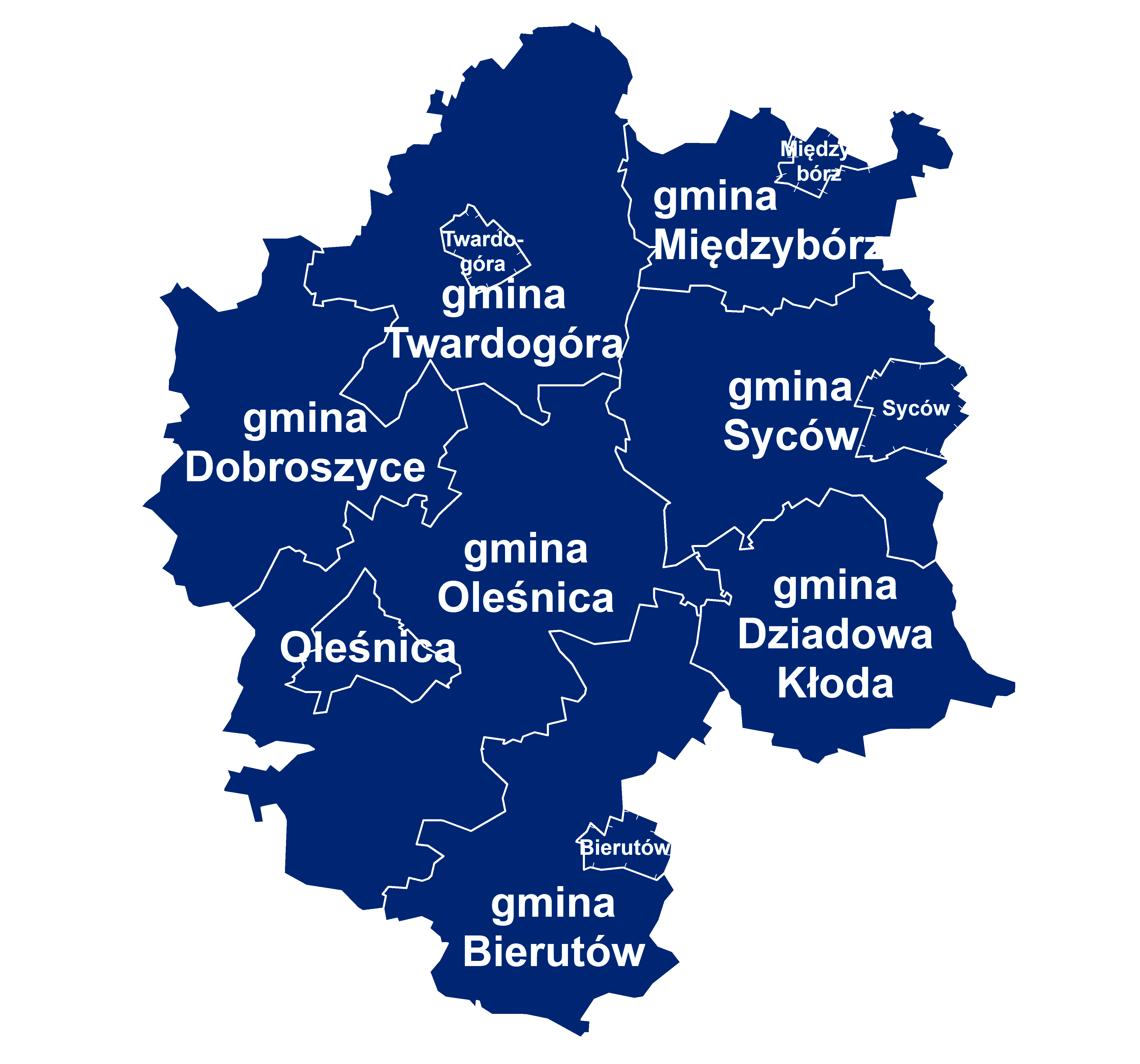 Kontury powiatu oleśnickiego z zaznaczeniem granic gmin i miast + opis